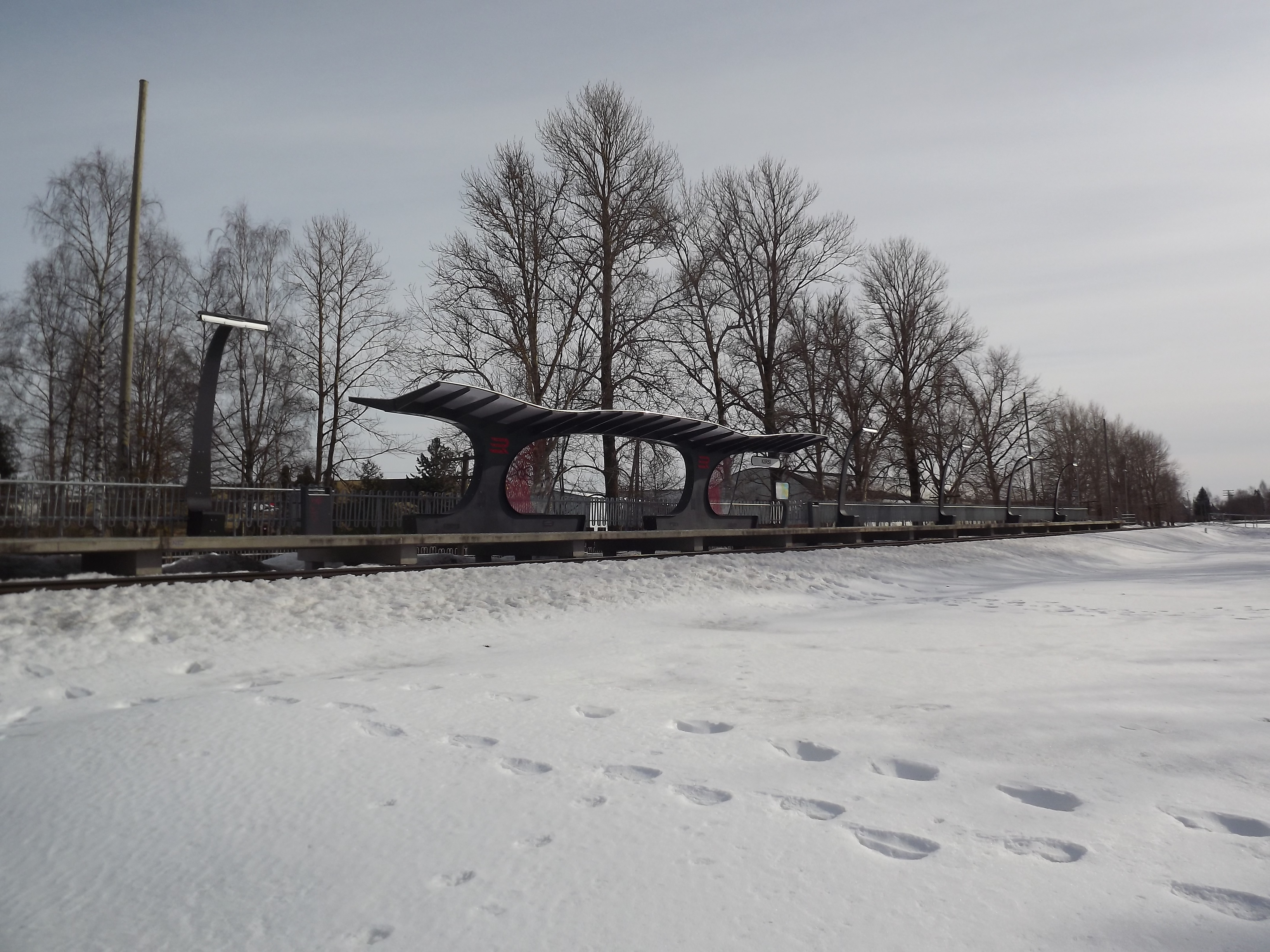 Kirsi raudteepeatus kevadel